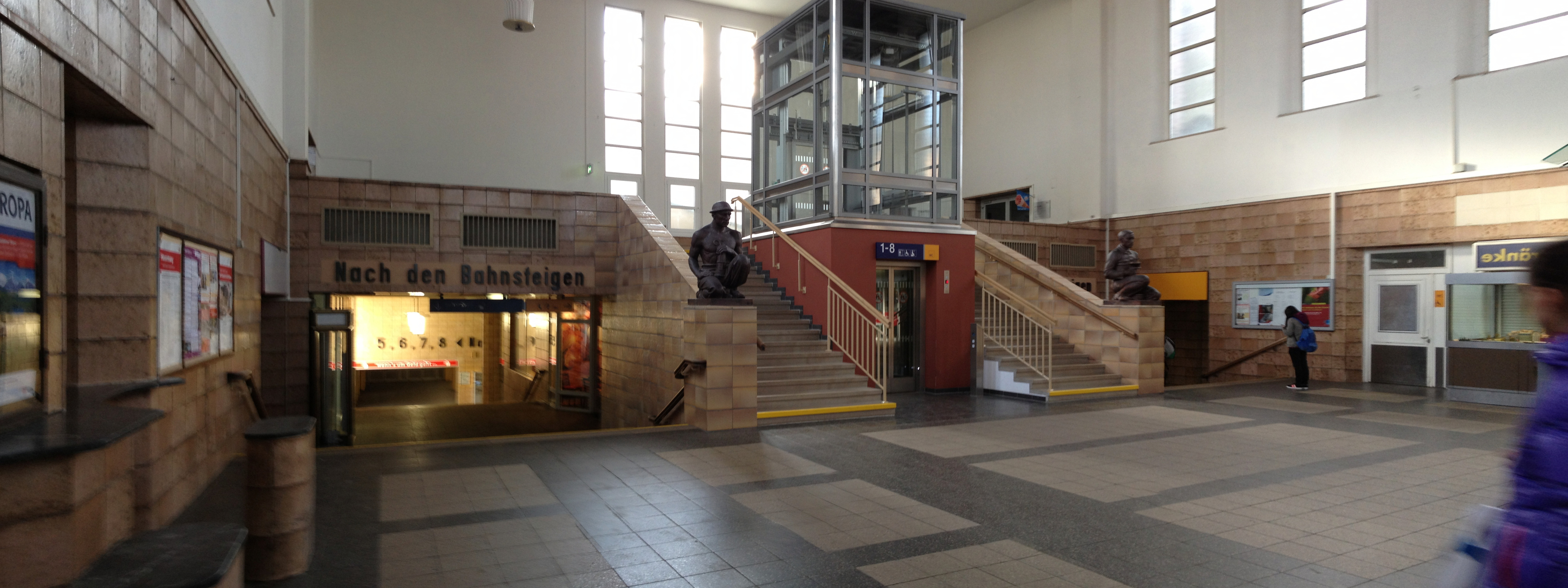 Eingangshalle mit sozialistischen Statuen.